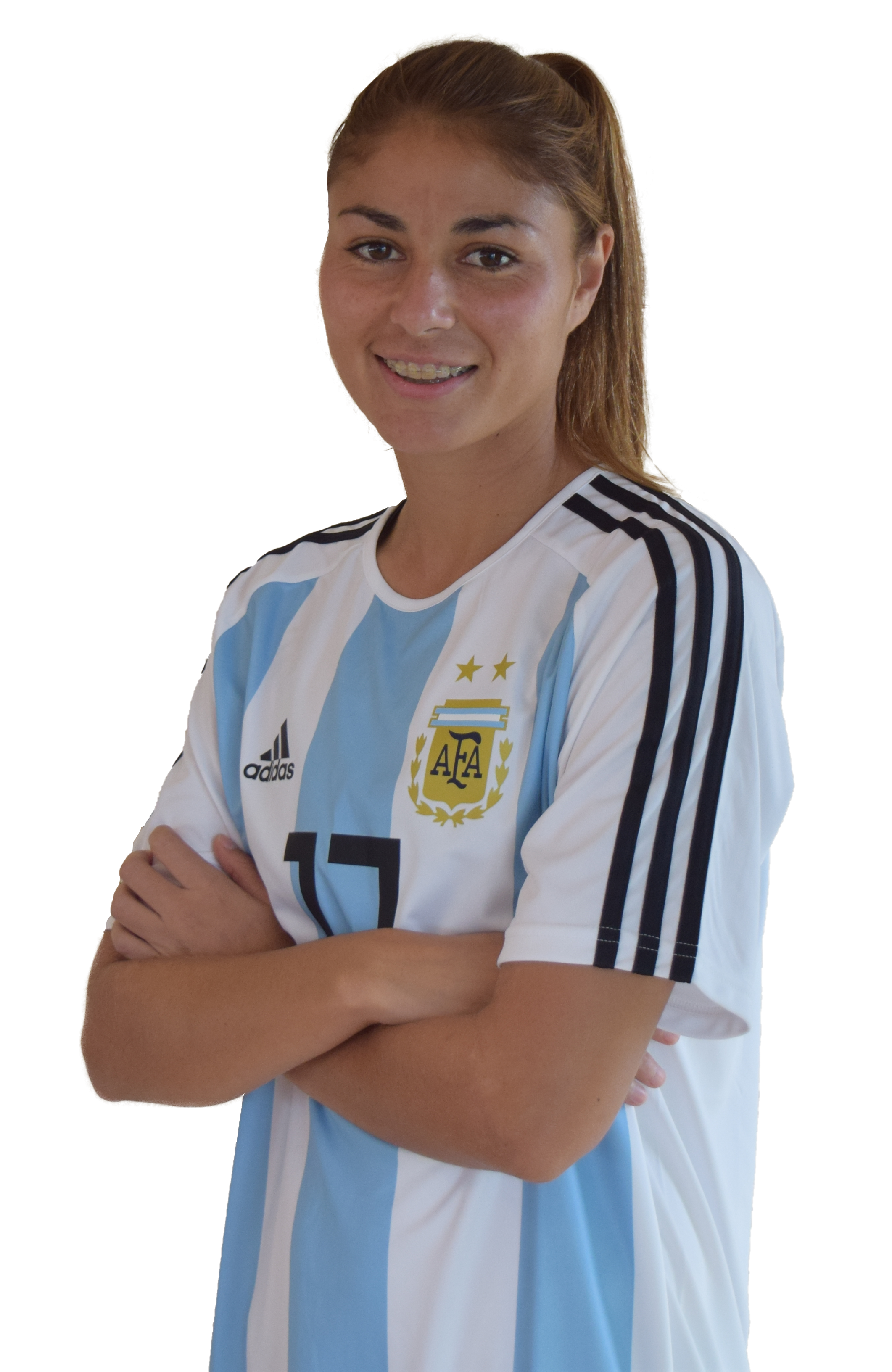 Vanesa Santana, jugadora de la selección mayor femenina de fútbol de Argentina.Foto sacada previo al primer partido del repechaje por un lugar para el mundial de futbol femenino de Francia 2019